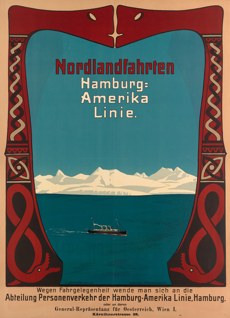 Carl Langhein: Plakat, Nordlandfahrten Hamburg-Amerika Linie, 1905. 40 1/4 x 29 inches, 102 1/4 x 73 3/4 cm. Kunstdruckerei Kunstlerbund Karlsruhe.